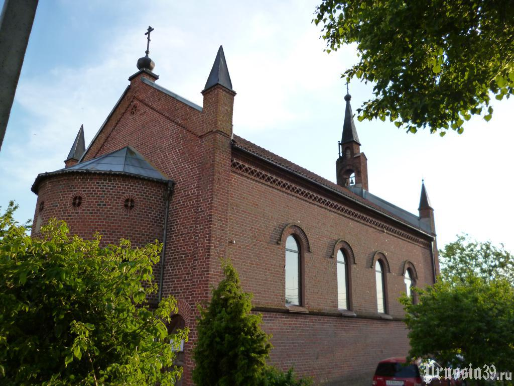 Храм преподобного Сергия Радонежского в посёлке Рыбачий, вид с северо-востока